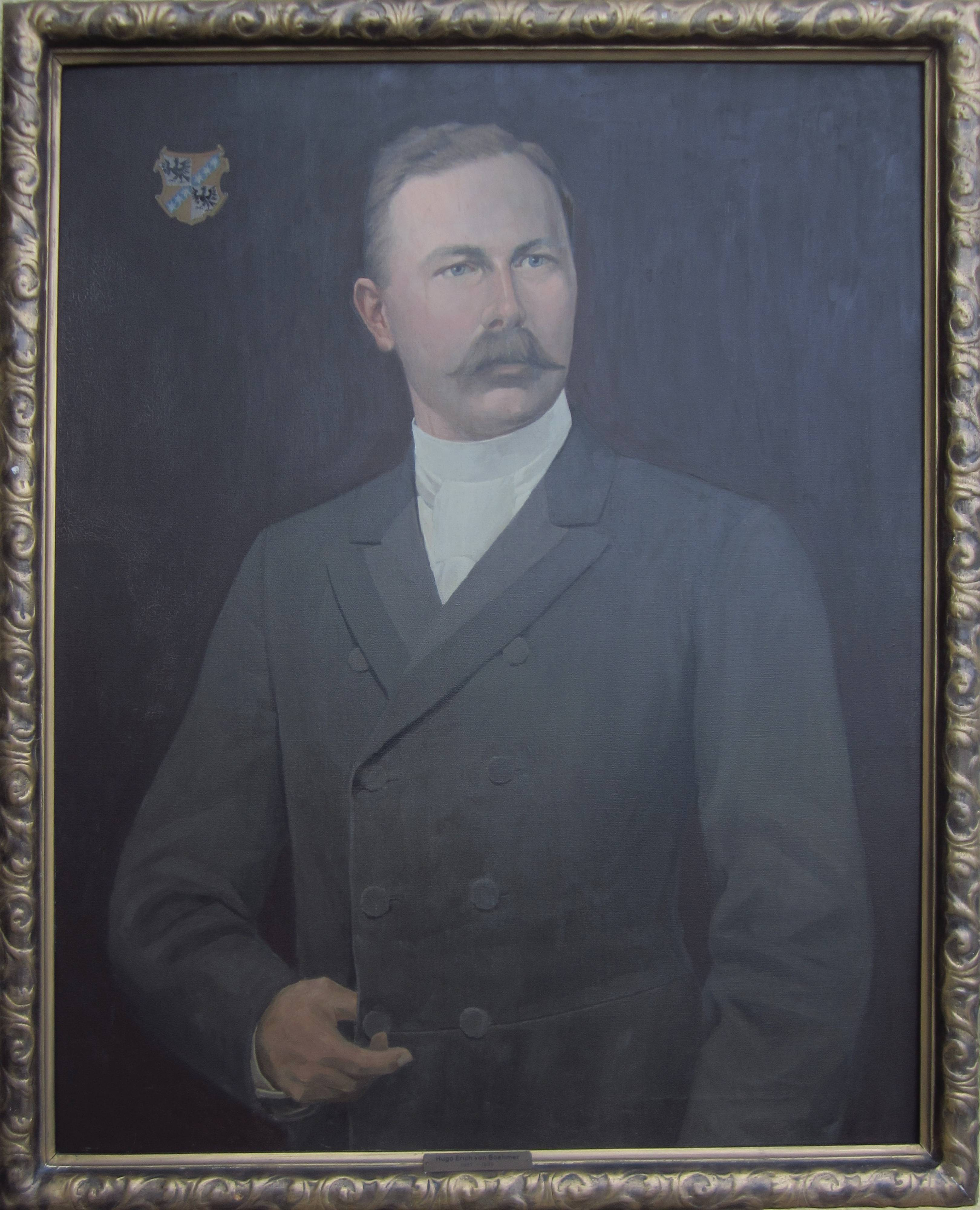 Boehmer von Hugo Erich (1868–1954), 1893 geschaffenes Öl- oder Pastellbild anlässlich der Heirat mit Hugo Erich von Boehmer. Durch Marie Luise Ottilie von der Osten (* 25. Dez. 1856, † nach 1932) hiervon 1931 angefertigte originalgetreue Kopie in Öl auf Leinwand. Hiervon 2014 erstellte fotomechanische Reproduktion